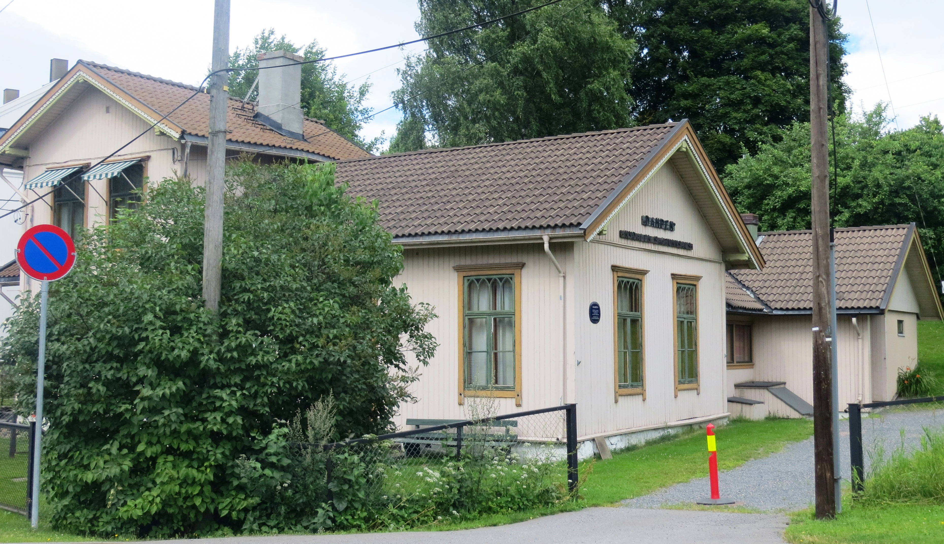 19th Century workers' environment buildings in upper Nydalen, Oslo